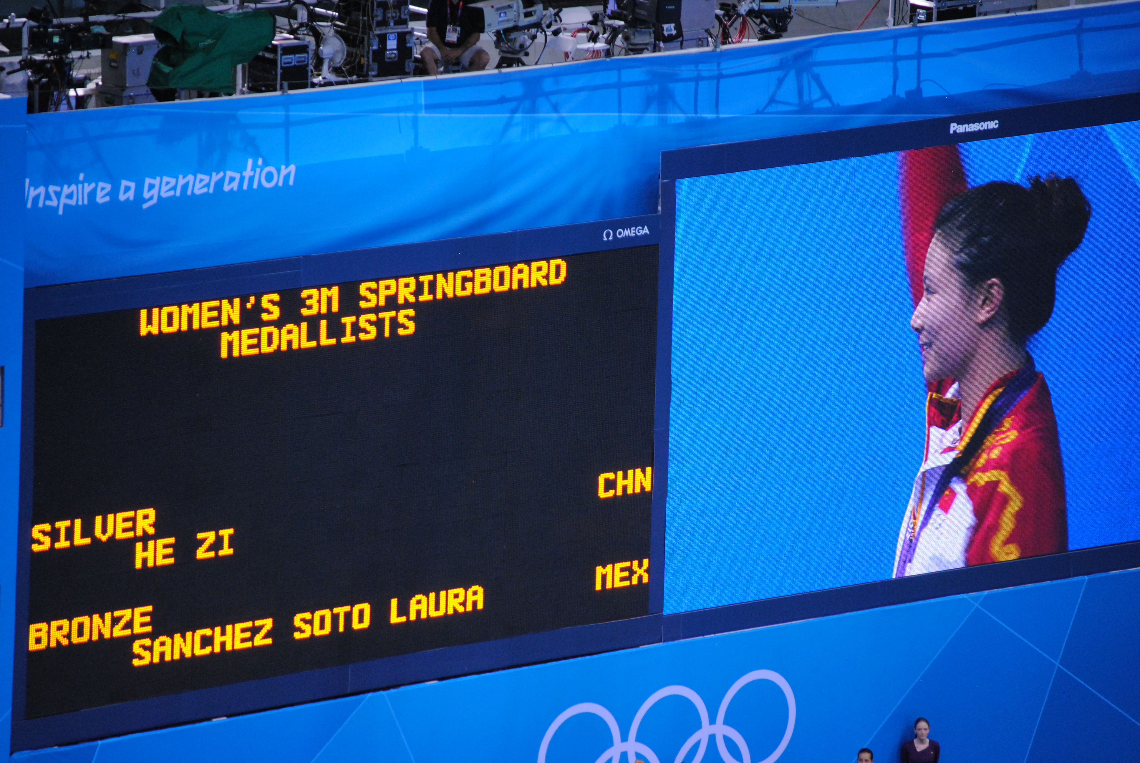 Silver Medalist - He Zi (China)